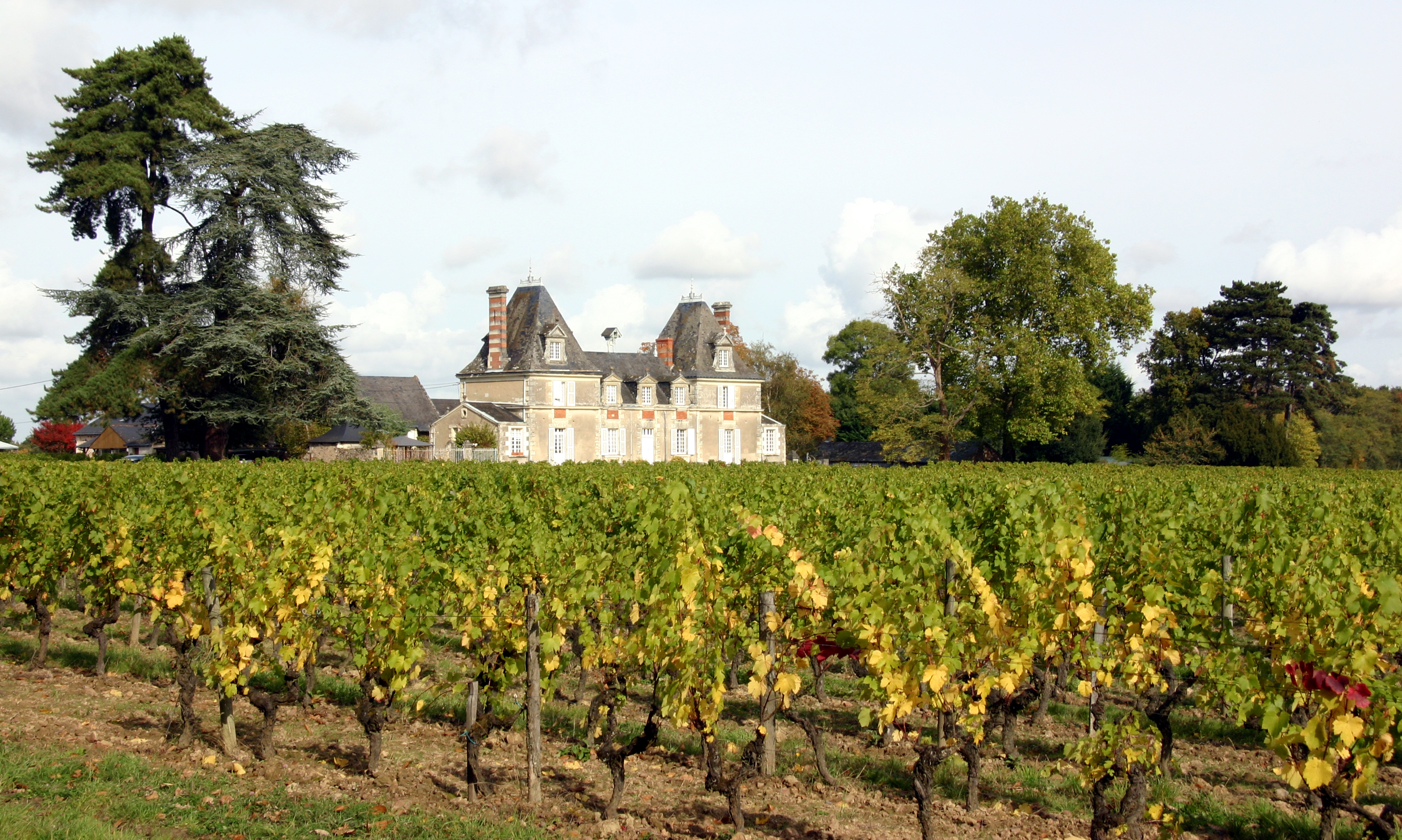 Blaison-Gohier